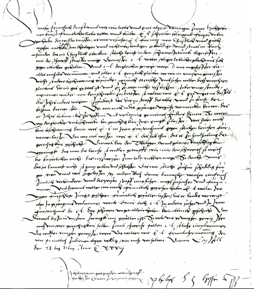 Brief von Landgraf Philipp an Kurfürst Friedrich wegen Behandlung von Wiedertäufern